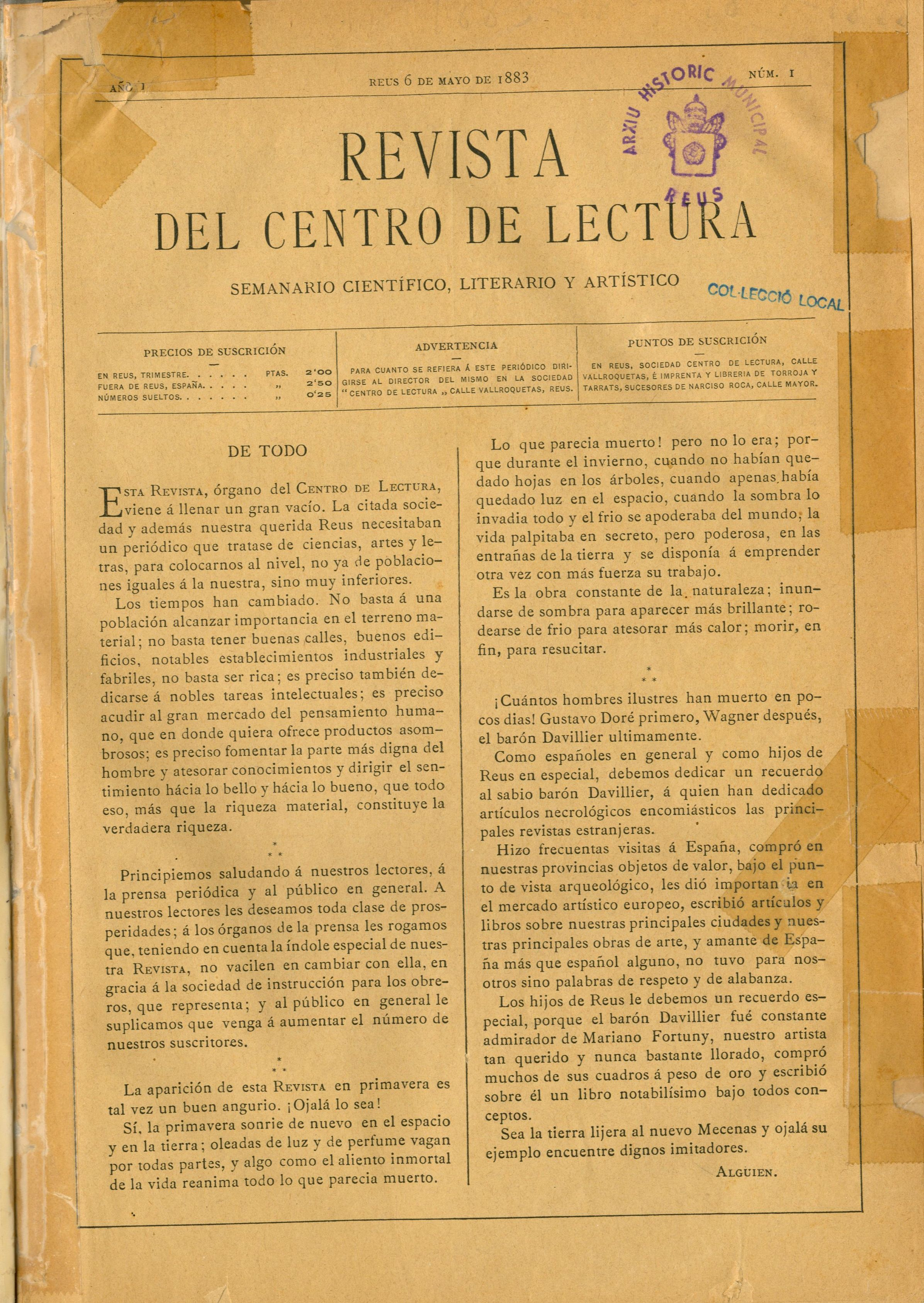 Primera pàgina del núm. 1 de la Revista del centro de lectura. 1883